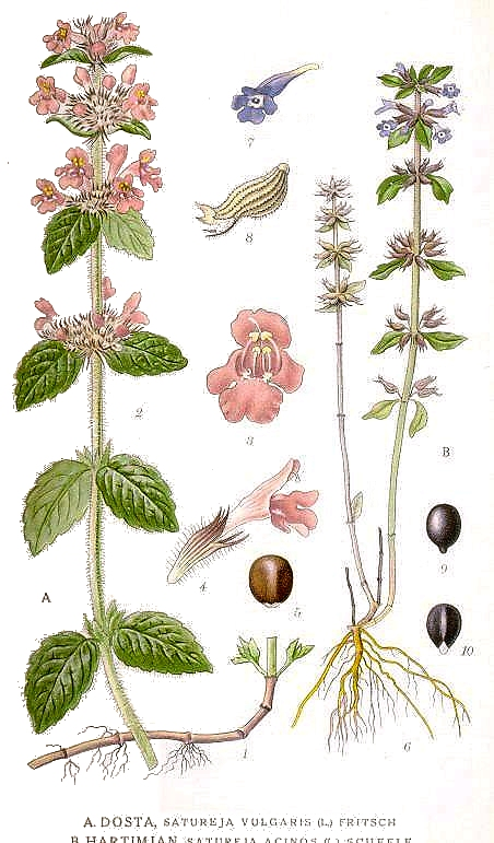 Clinopodium vulgare L. subsp. vulgare, Clinopodium acinos (L.) Kuntze. Original Description A. Dosta, Satureja vulgaris (L.) Fritsch B. Hartimjan, Satureja acinos (L.) Scheele